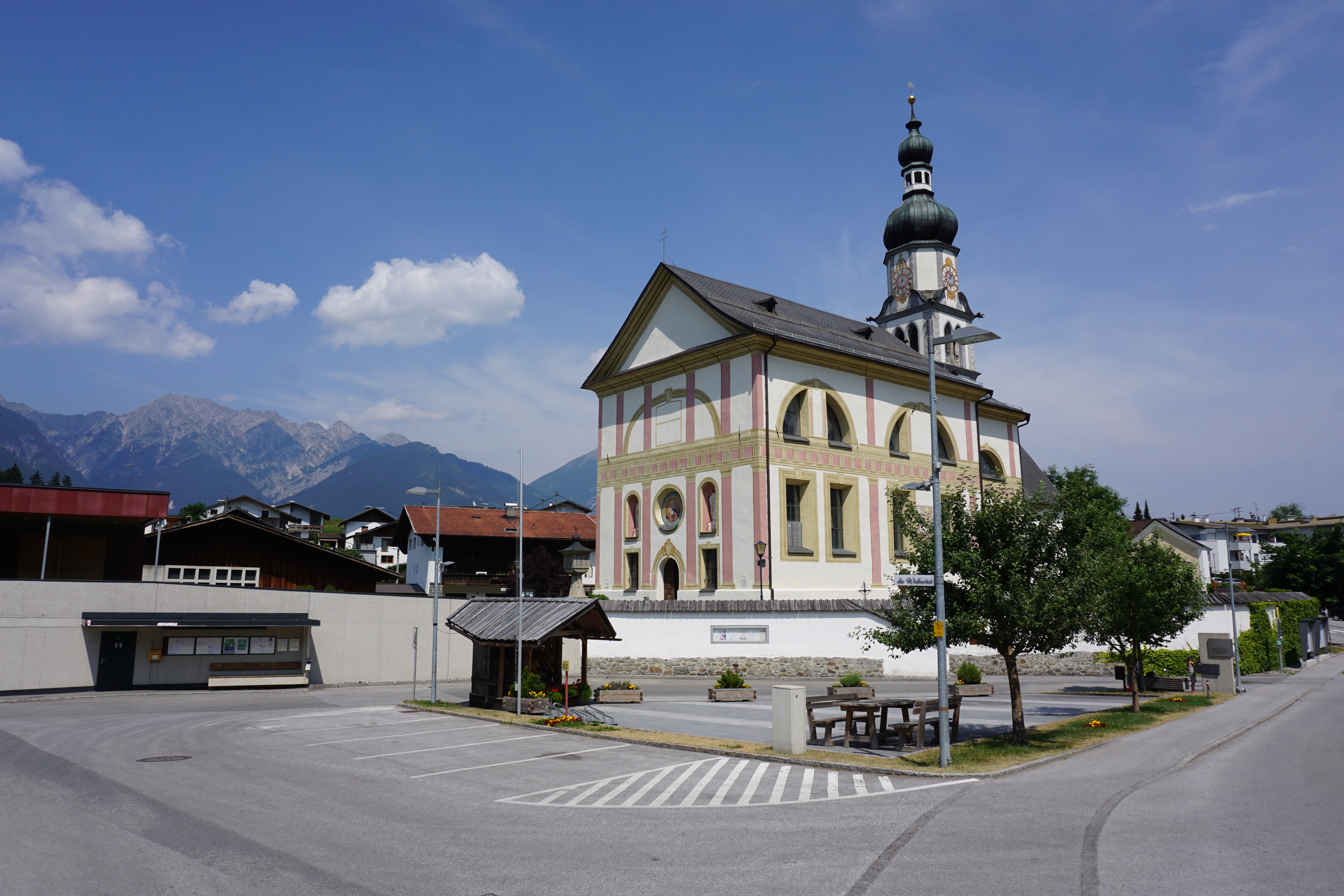 Ranggen: Platz an der Hauptstraße, vor der Kirche